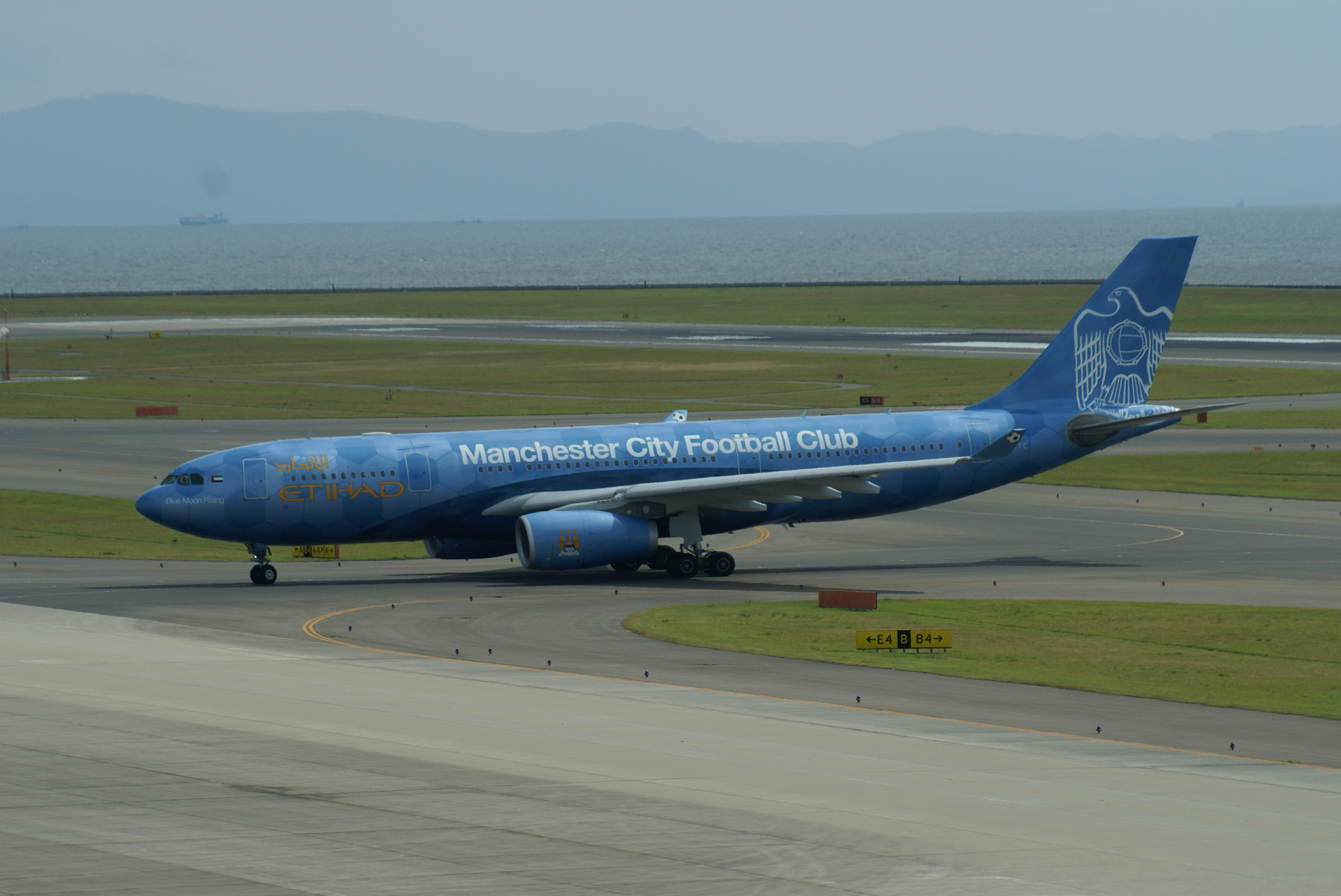 中部国際空港、マンチェスターシティ, Taken at Nagoya Chubu Centrair Airport, Japan